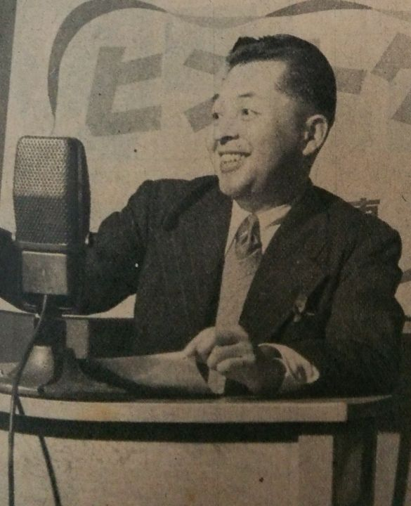 角倉節朗（アナウンサー）